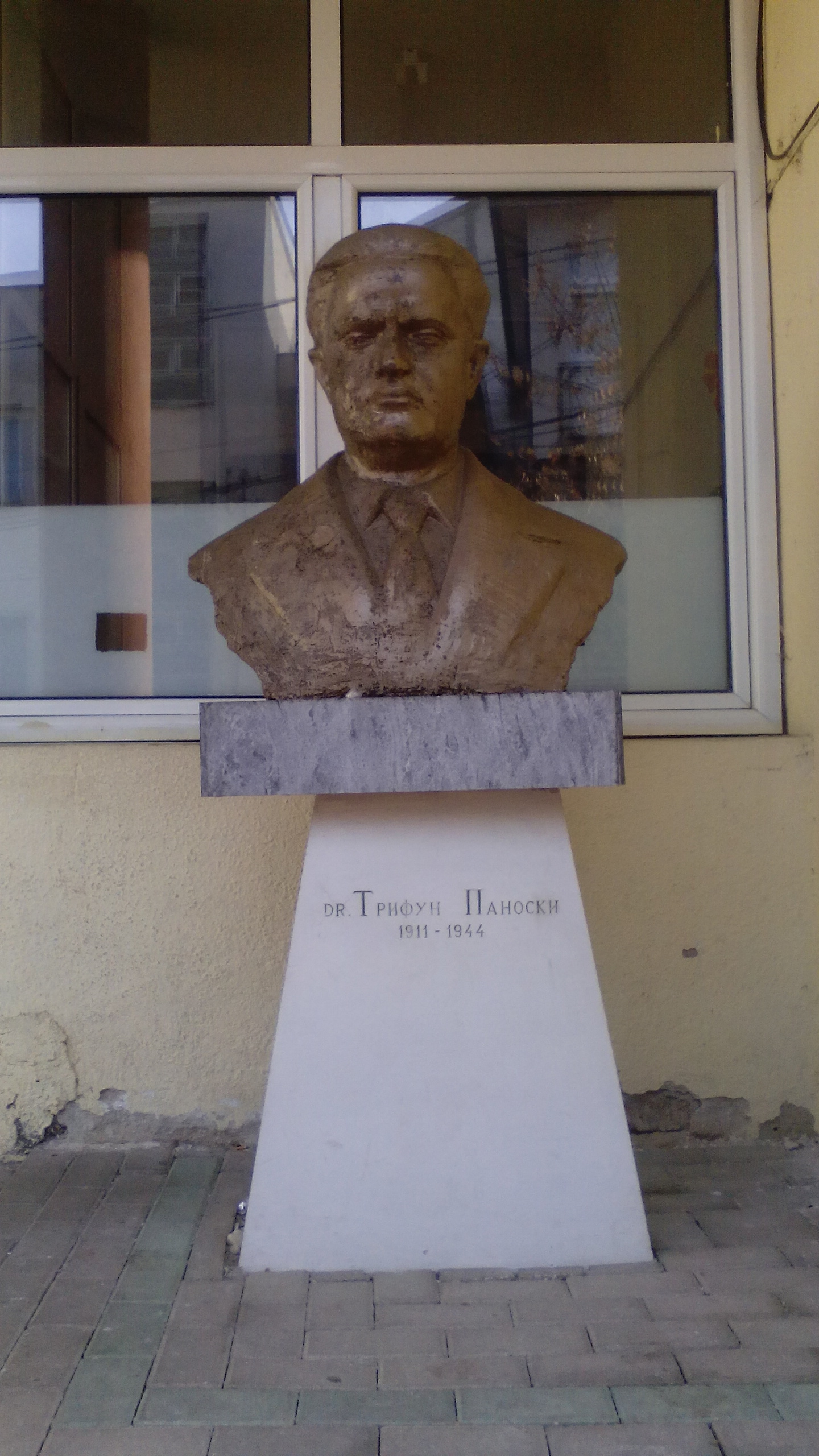 Биста на Трифун Пановски во основното училиште во Битола што го носи неговото име